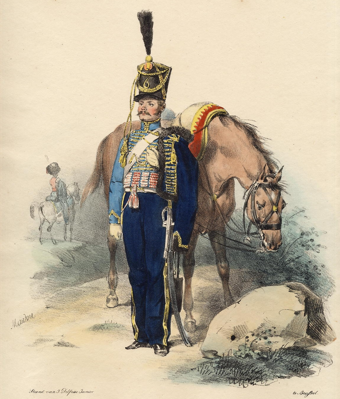 Huzaar, Cavalerist met paard van het Nederlandse leger omstreeks 1825.